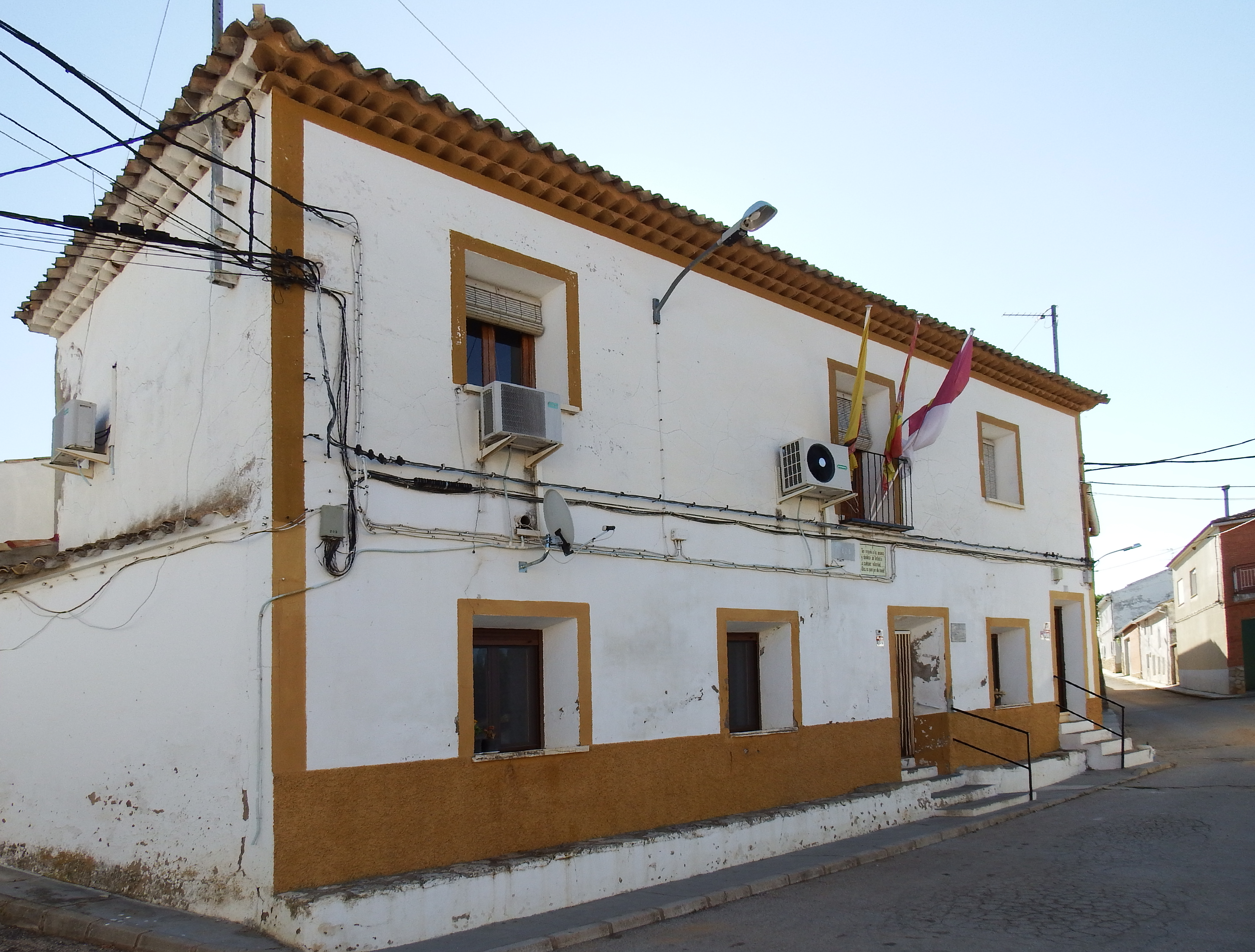 Piqueras del Castillo. Ayuntamiento.